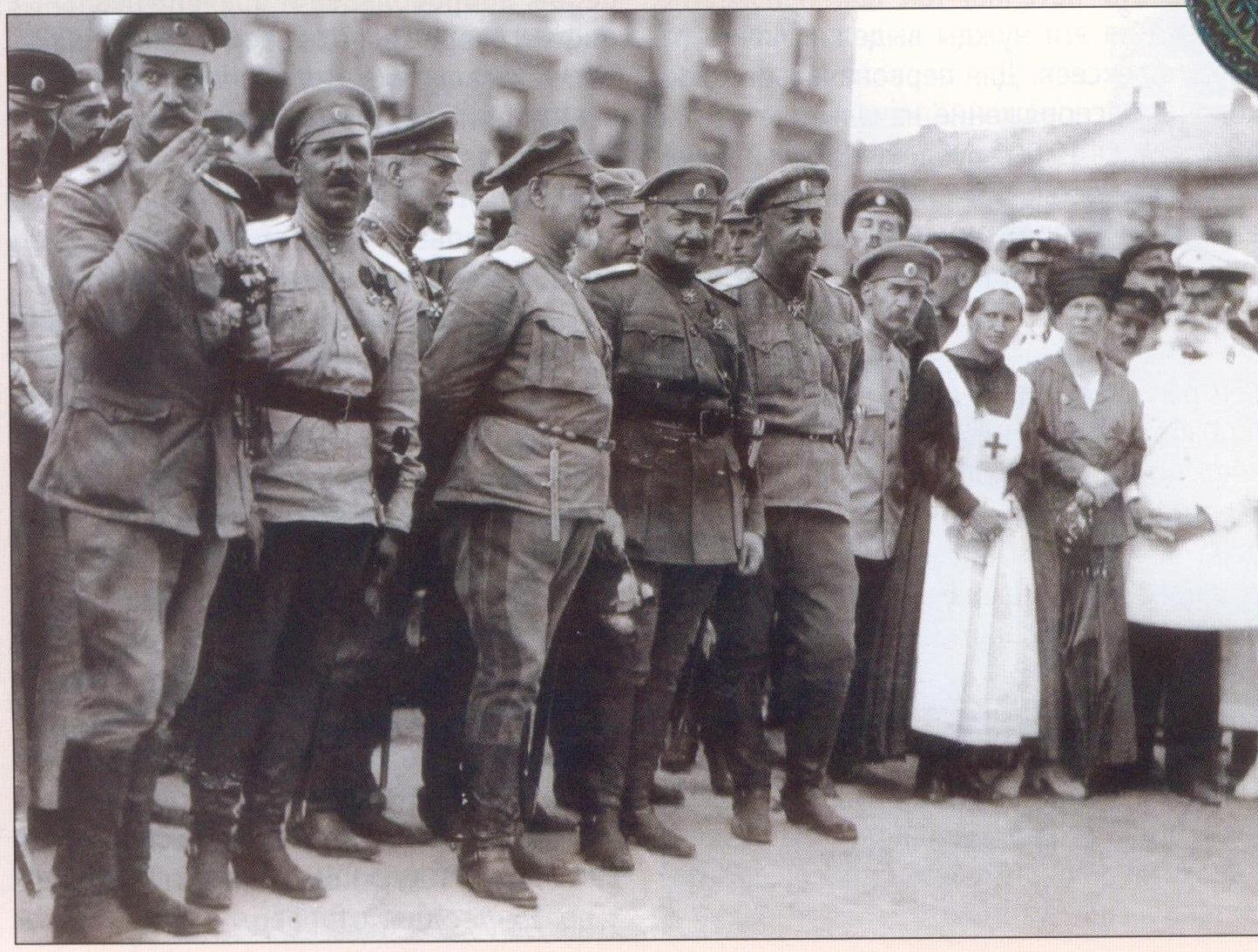 Парад после освобождения Харькова Добровольческой армией. 15(28) июня 1919 (относительно даты см. Антон Туркул. Дроздовцы в огне: Харьков. Мюнхен, 1947; Николай Николаевич Ребриков. Дневник дроздовца-артиллериста. Вооружённые силы на Юге России. Январь-июнь 1919 года. М, Центрполиграф, 2003, с. 256, ISBN 5-95-24-0666-1). Фото сделано на Соборной площади, позади здание присутственных мест. В центре (третий слева) Главком ВСЮР Антон Иванович Деникин, за ним по его левую руку начальник оперативного отдела ВСЮР генерал Иван Романовский и генерал Ю.И. Плющевский-Плющик. По правую руку от Деникина стоит полковник Шапрон-де-Ларре, бывший адъютант создателя Добровольческой армии генерала Михаила Алексеева и муж дочери генерала Лавра Корнилова. Внук полковника Шапрона - де-Ларре и правнук генерала Корнилова, Лавр Корнилов-де-Ларре проживает ныне во Франции и является единственным прямым потомком Корнилова. Перед парадом.